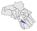 Mapa de Naüja a l'Alta Cerdanya, obtingut a partir d'un altre mapa de lliure diposició.